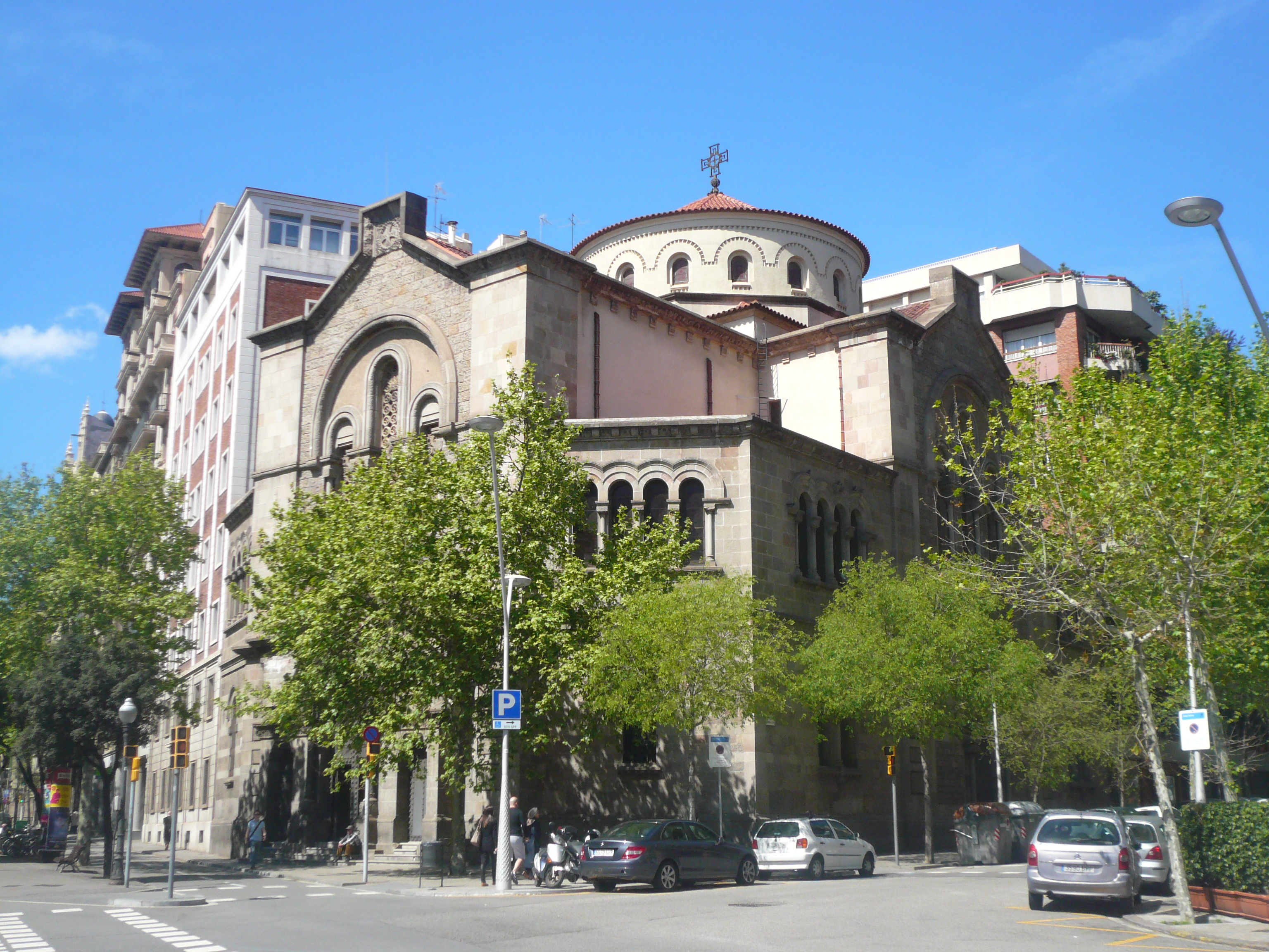 L'església del Carme, de Domènech i Estapà, vista des de la Diagonal.